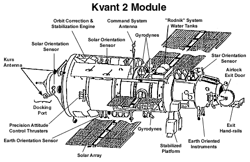 Mir Kvant-2 module